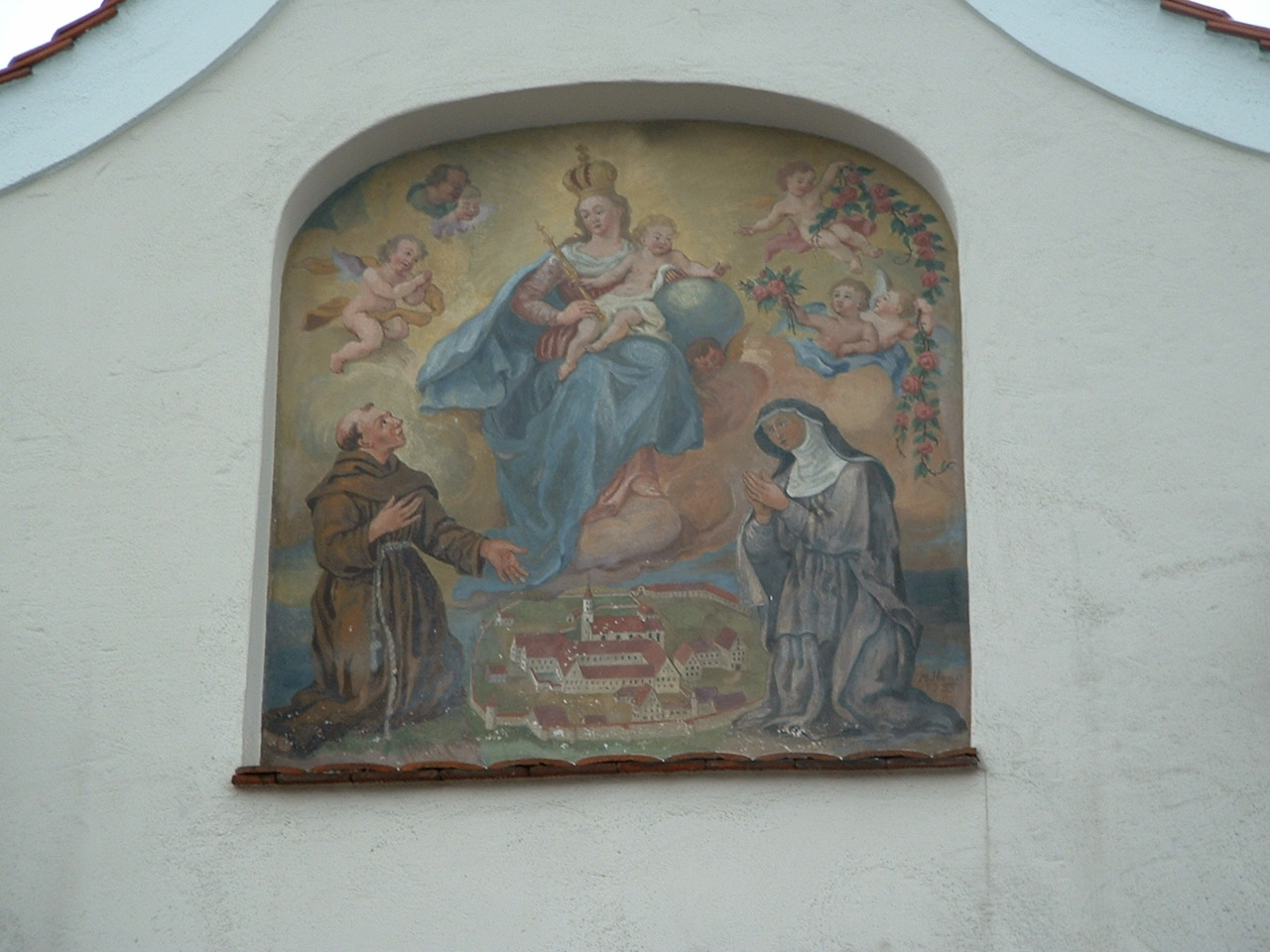 Darstellung des Klostergeländes auf einem Wandgemälde am nördlichen Tor zum Klosterhof Söflingen (18. Jahrhundert)